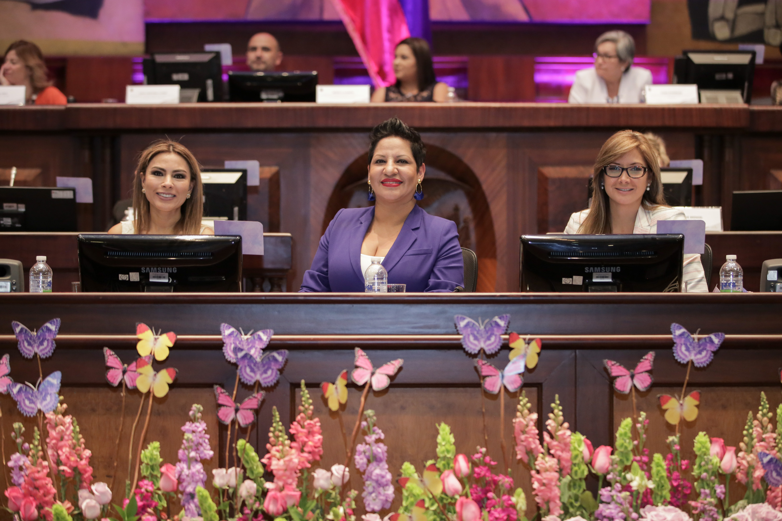 25 de octubre de 2017 - Foro Internacional "Hacia una ley de prevención y erradicación de la violencia contra las mujeres – Ecuador 2017" Tema: La Asamblea Nacional del Ecuador y la Comisión Especializada Ocasional para el tratamiento de la Ley Orgánica Integral para Prevenir y Erradicar la Violencia de Género contra las Mujeres invitan al Foro Internacional "Hacia una ley de prevención y erradicación de la violencia contra las mujeres – Ecuador 2017" con los expertos internacionales: - Claudia Ramírez – Colombia - Miguel Llorente- España - Esperanza Martínez – Paraguay - Marianela Paco – Bolivia - Christine Brendel – ComVoMujer GIZ Fotografía: Alberto Romo/Asamblea Nacional